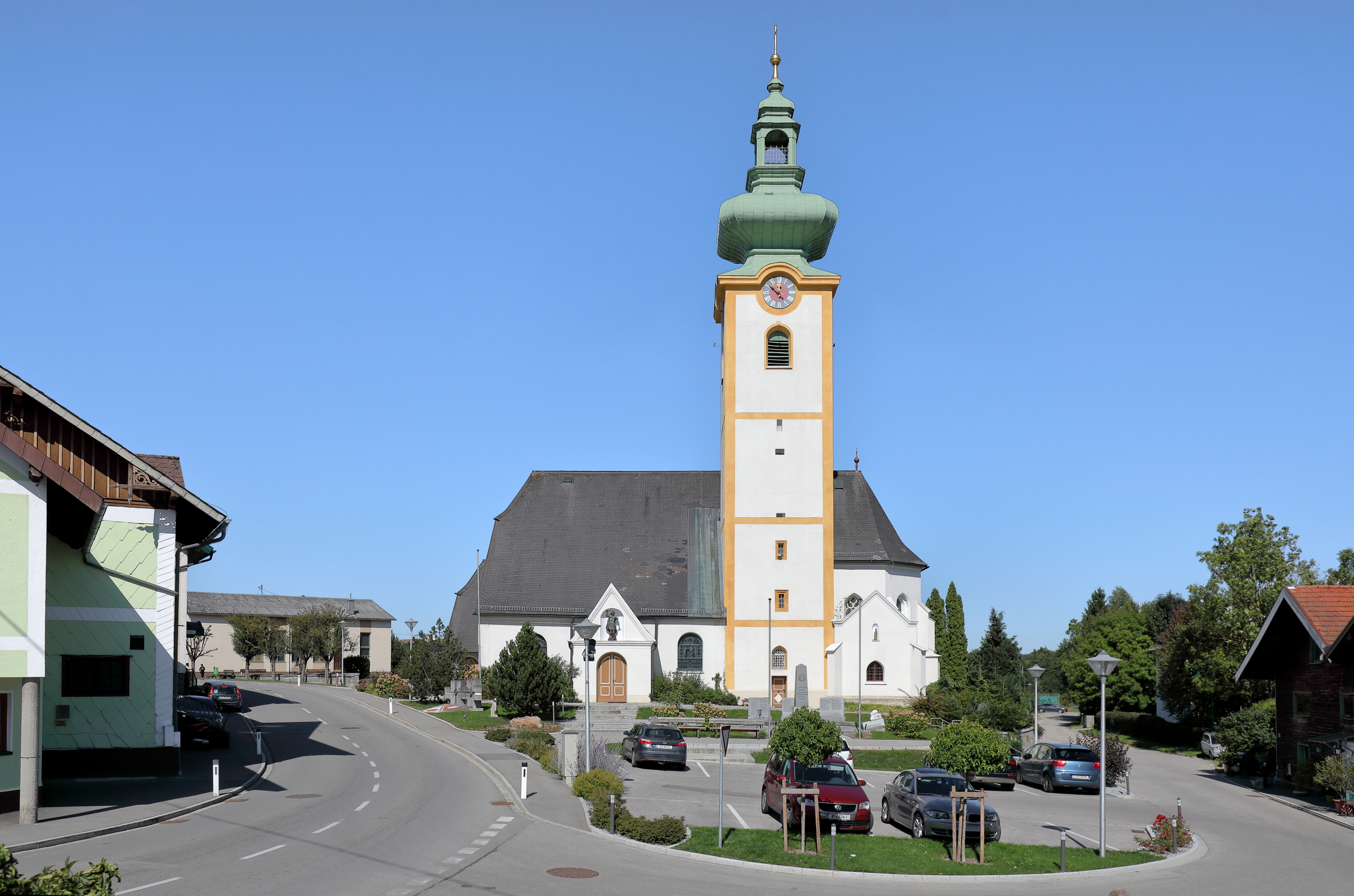 Südsüdostansicht der röm.-kath. Pfarrkirche hl. Michael in der oberösterreichischen Gemeinde Hohenzell.Ursprünglich eine gotische Kirche mit Dachreiter. Der Glockenturm im südlichen Chorwinkel wurde zur Barockzeit errichtet und 1685 wurde eine Seitenkapelle mit einer kleinen Eingangshalle angebaut.